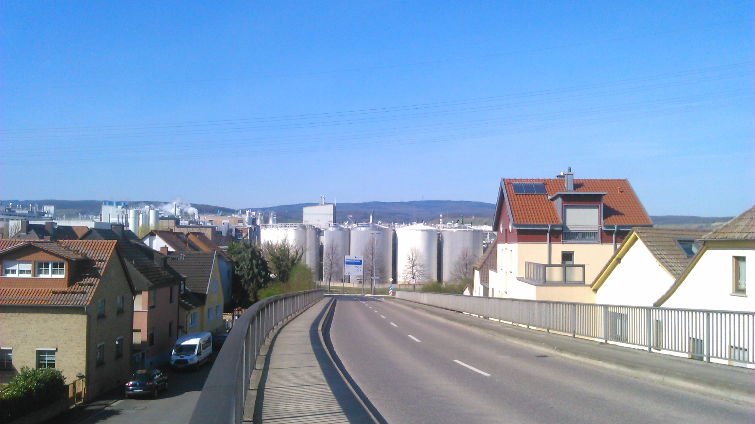 Blick auf die Chemische Fabrik Budenheim, im Hintergrund die Hohe Wurzel mit Fernmeldeturm